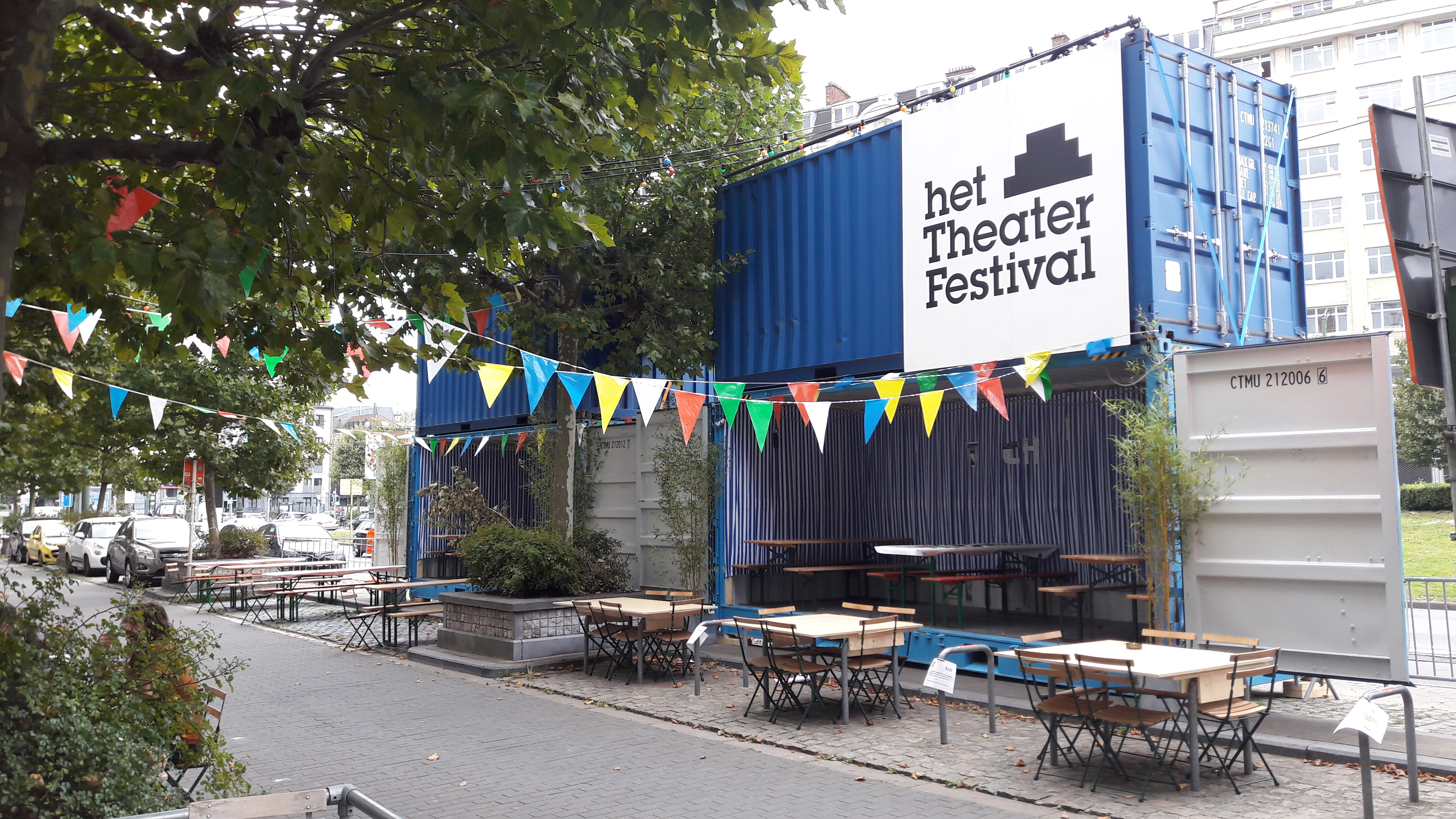 Sfeerbeeld van het festivalcentrum van Het Theaterfestival 2017.